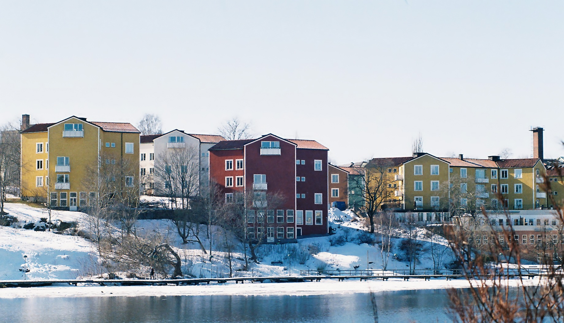 Gröndal sett från Reimersholme.